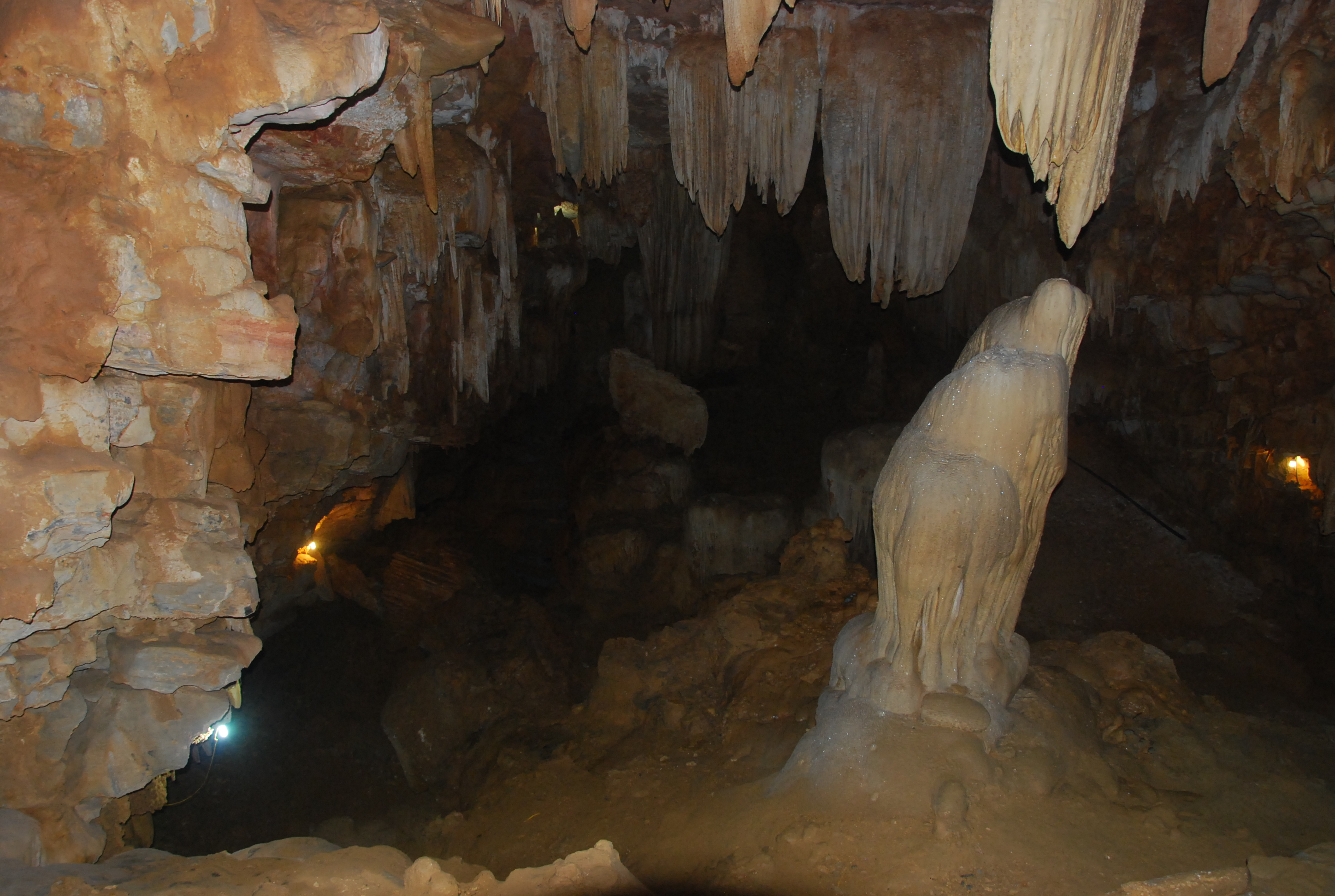 Động Vái Giời thuộc Thung Nham trong Quần thể di sản thế giới Tràng An